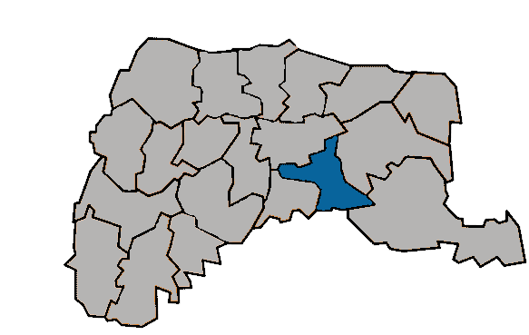 台灣省雲林縣斗南鎮 KaurJmeb為編輯台灣省zh:雲林縣繪製